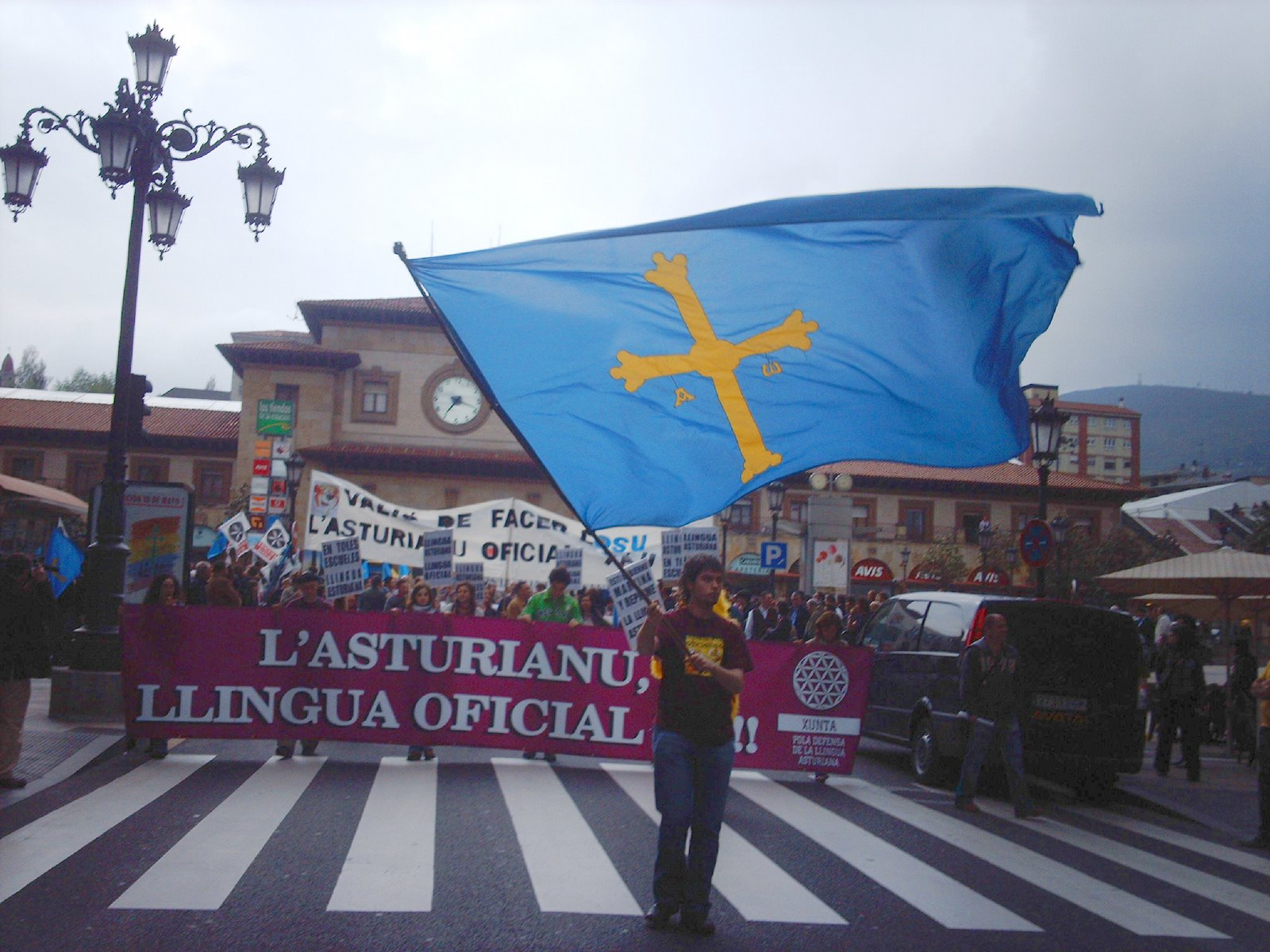 Manifestacion de les lletres asturianes 2007